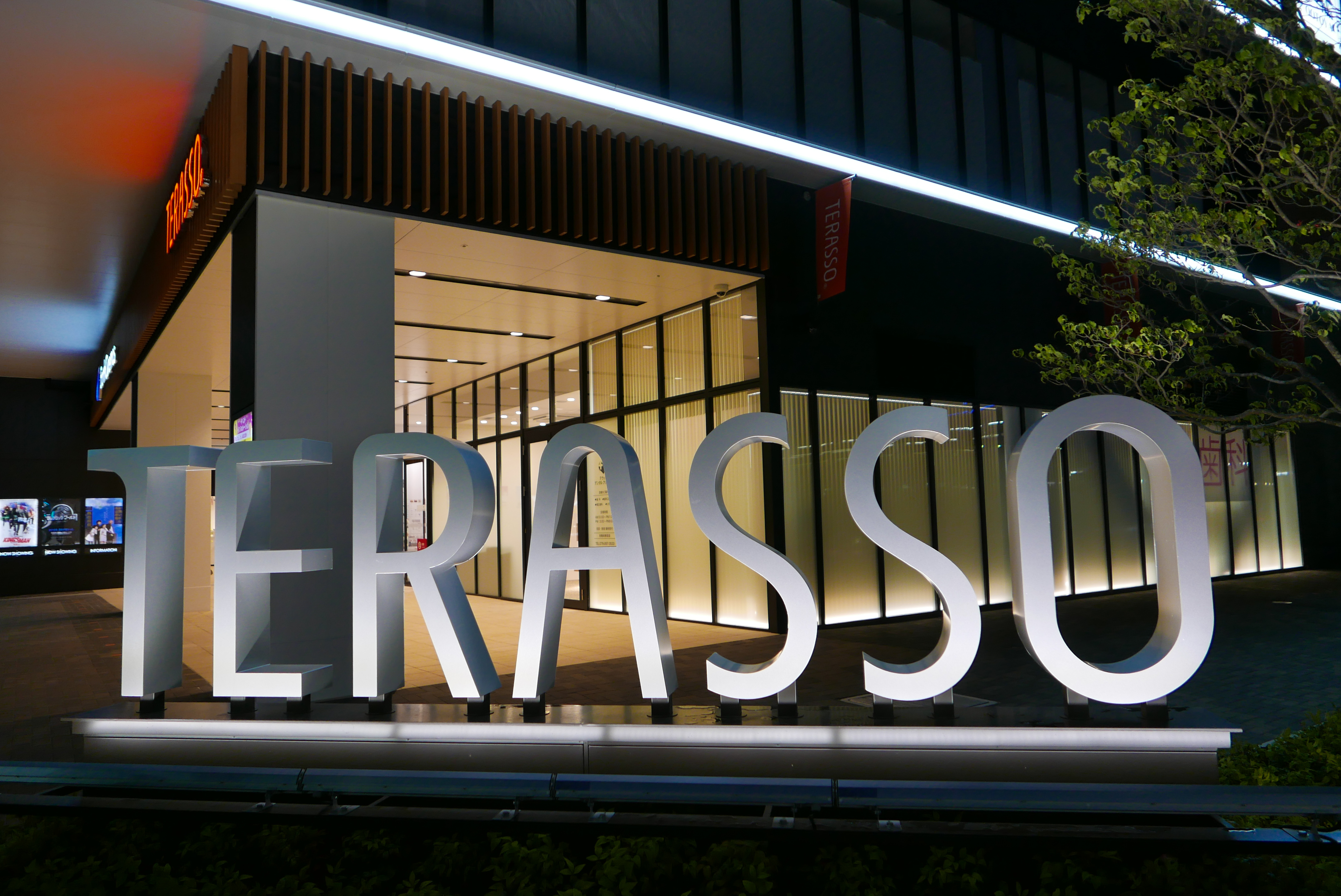 テラッソ姫路（ロゴ・夜景）